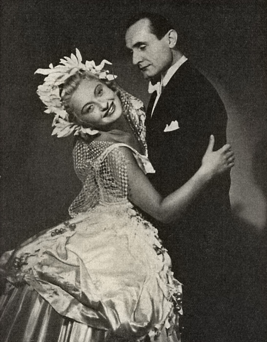 Eva Šenková (1923-2004), česká herečka, zpěvačka a tanečnice